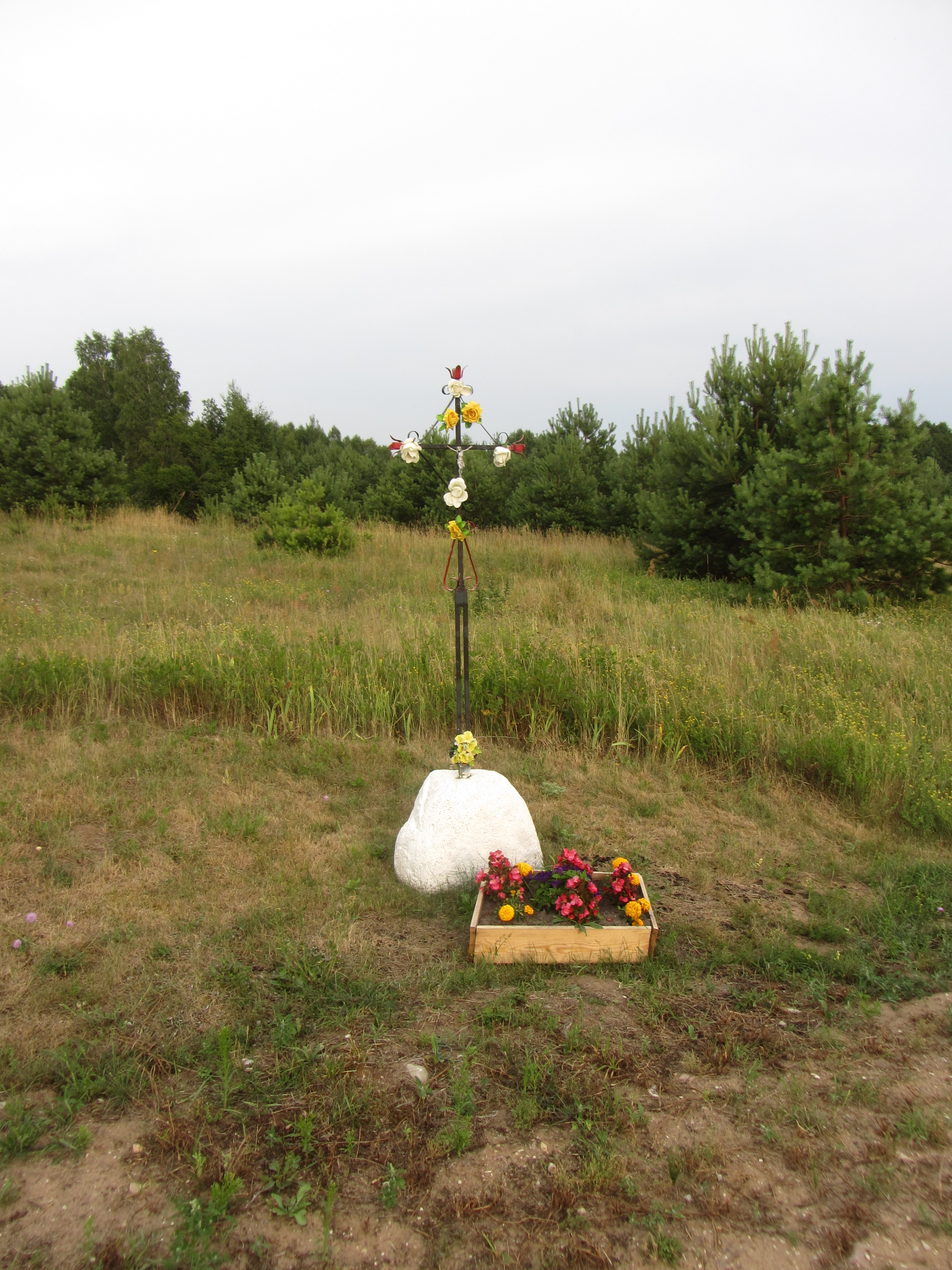 Veisiejų sen., Lithuania